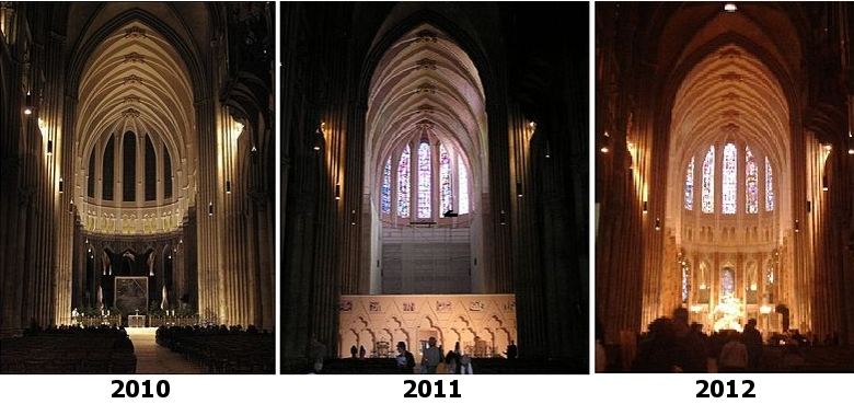 Evolution, sur trois clichés, des travaux de restaurations du choeur de la Cathédrale de Chartres sur trois ans (Premièrement le haut-choeur seul restauré, puis le reste, et enfin le tout dévoilé).